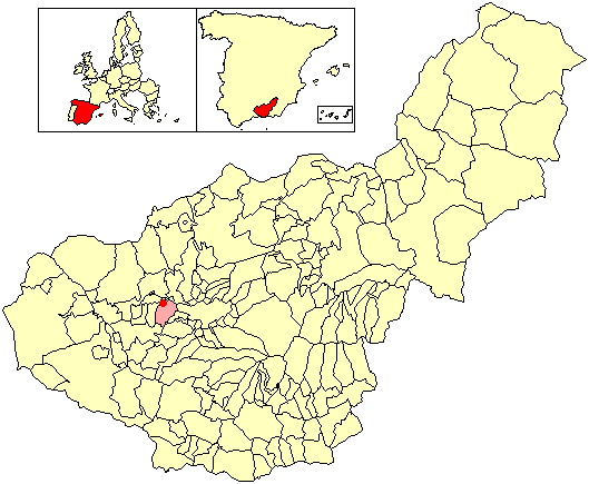 Situación de la localidad de Pedro Ruiz (en el municipio de Santa Fe) respecto a la provincia de Granada, en España.